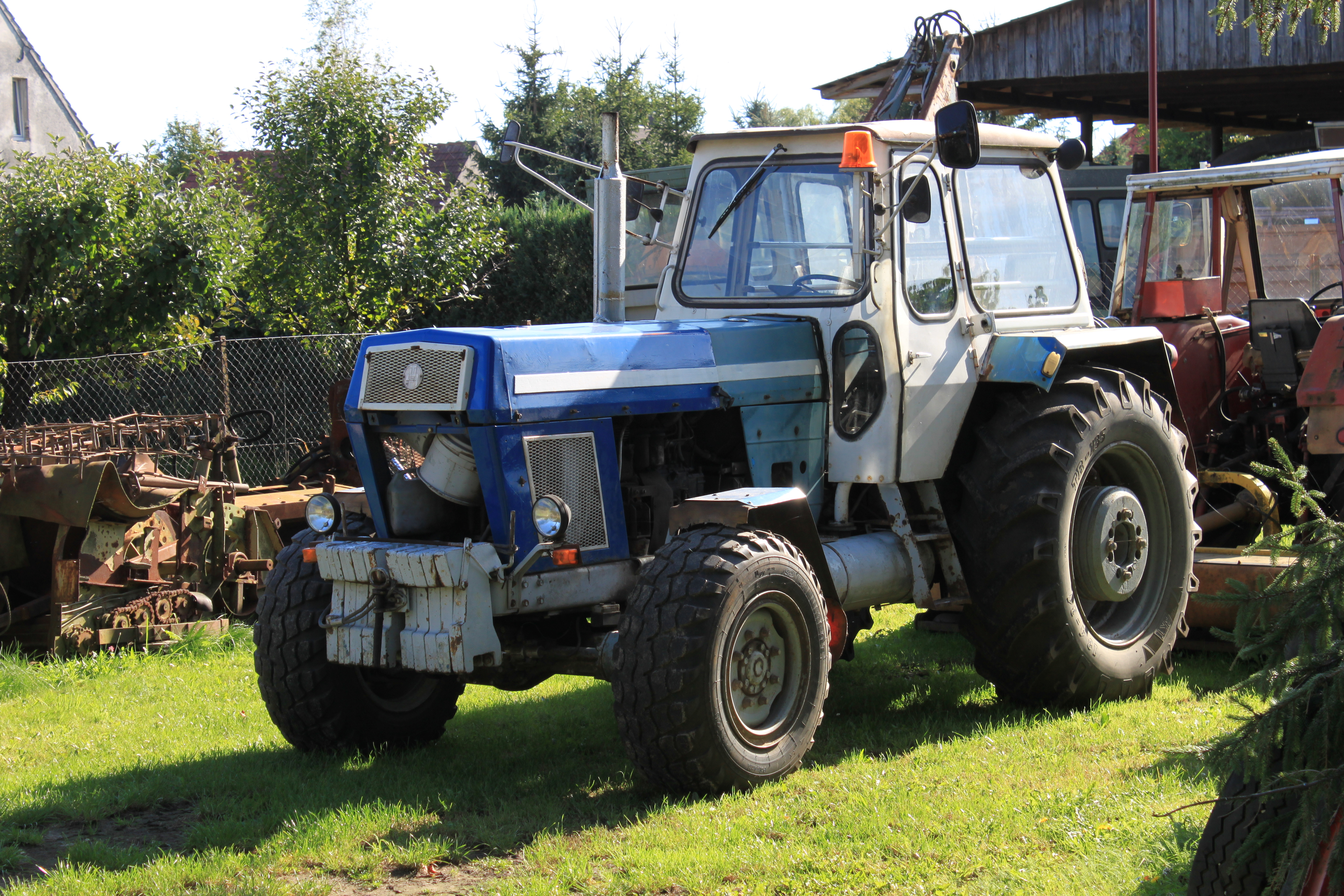 ZT 303